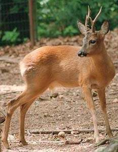 矮鹿